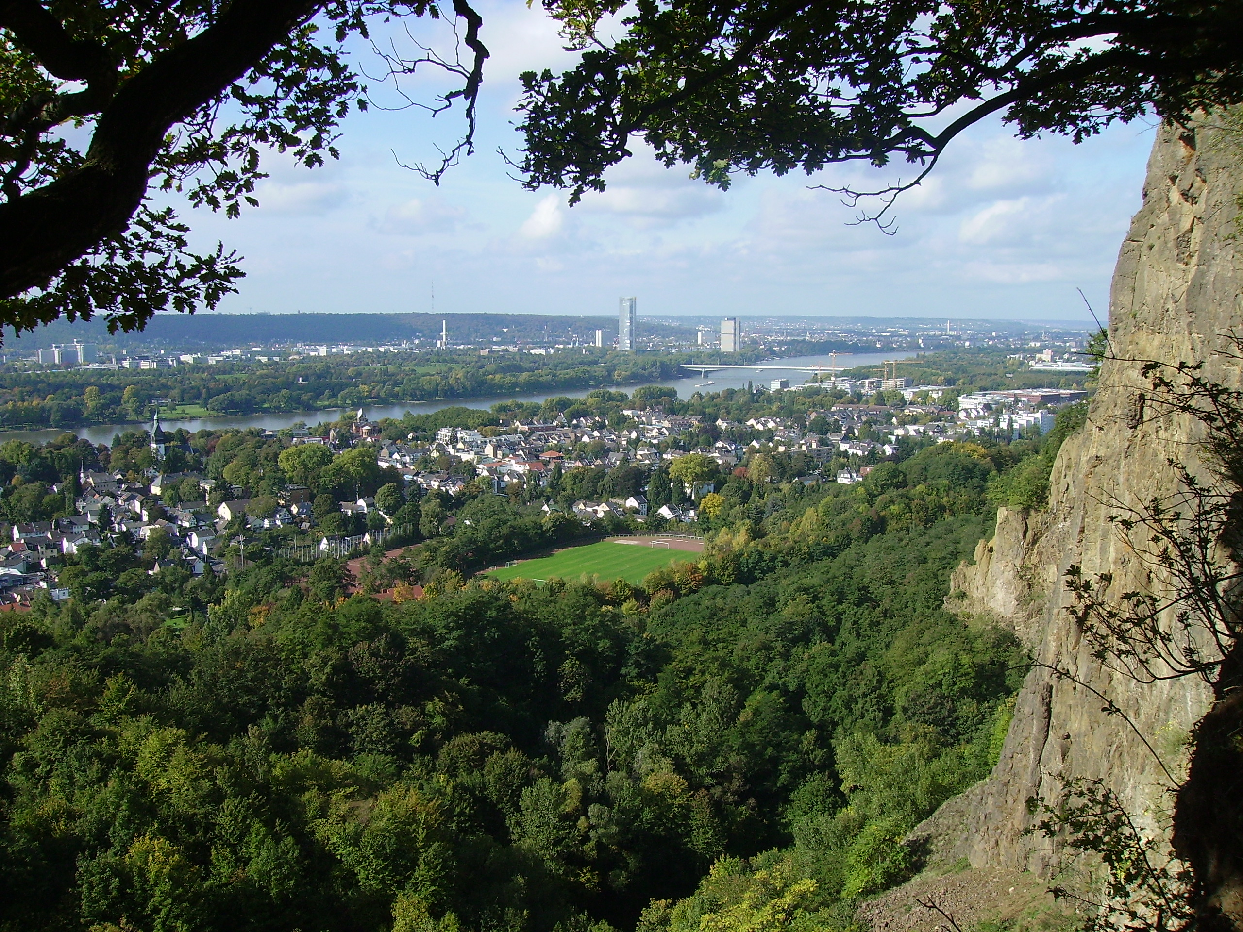 Blick aus dem Steinbruch nach Oberkassel und Bonn